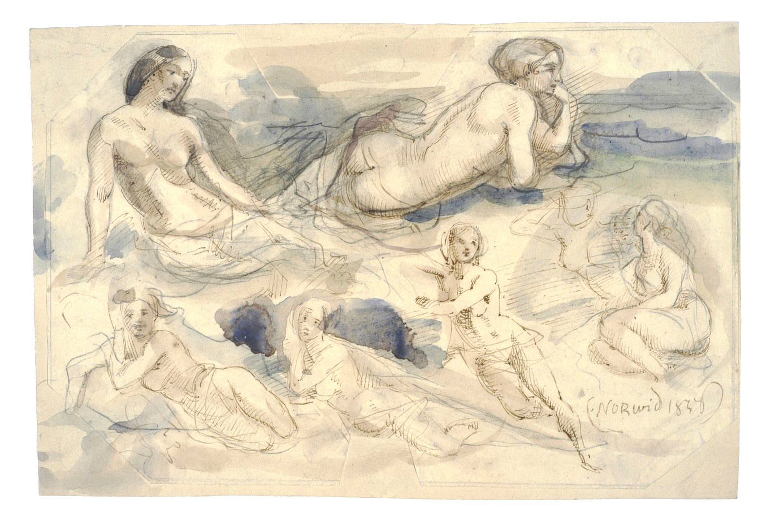 Najady